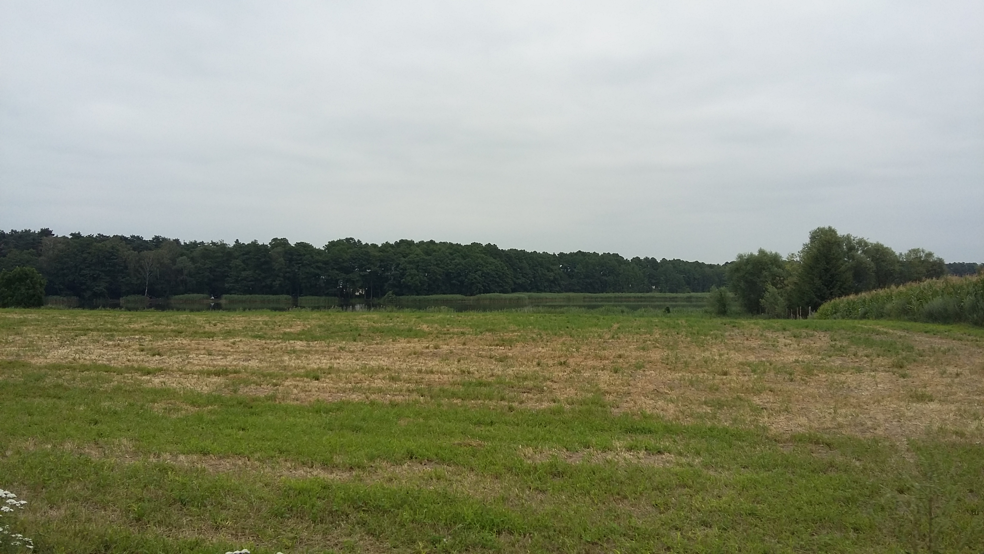 Widok na jezioro Buszewskie.